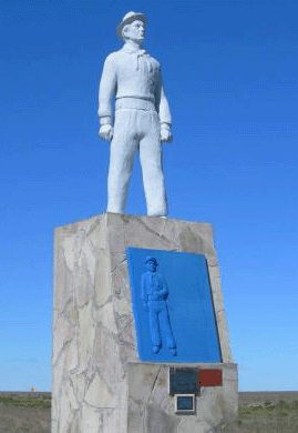 monumento a Facon Grande. Ubicado en en el cruce de la Ruta Nacional N° 3 y la Ruta provincial N° 281, Estación Jaramillo, Provincia de Santa Cruz, Argentina. Según la inscripción del letrero: "Una Historia que no se olvida. En 1920 se origina una huelga en todo el territorio santacruceño, culminando en 1921 con el fusilamiento de mas de 1000 trabajadores rurales, entre ellos uno de los líderesdela zona norte de la provincia cuyo nombre José Font, mas conocido como Facón Grande. En un lugar cercano a la estación del ferrocarril en Jaramillo. Años mas tarde en ese mismo lugra se filmaron escenas de la película Argentina La Patagonia rebelde, basada en la obra del escritor Osvaldo Bayer. Hoy los jaramillenses le rendimos elpermanente homenaje a ese hombre que defendió con su muerte el derecho de los trabajadores". Enero 2012. Jaramillo, Santa Cruz, Argentina.